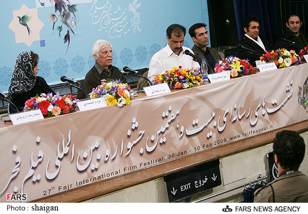 نشست خبری فیلم وقتی همه خوابیم، بیست و هفتمین دوره‌ی جشنواره‌ی فیلم فجر